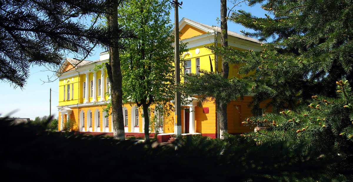 Беларуская (тарашкевіца): Палацава-паркавы комплекс Шырынаў у Германавічах